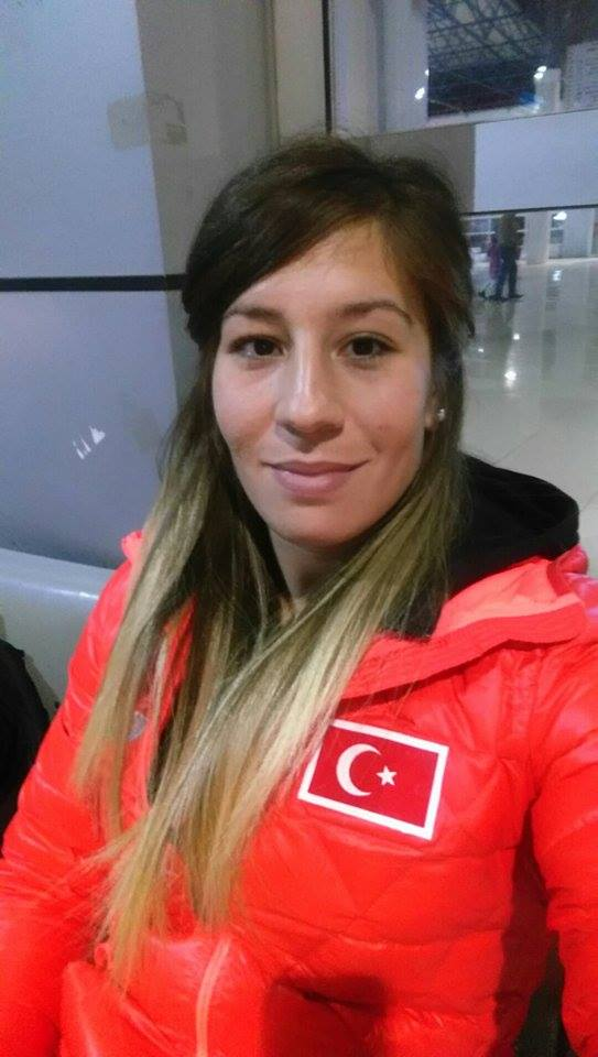 Türk güreşçi Yasemin Adar